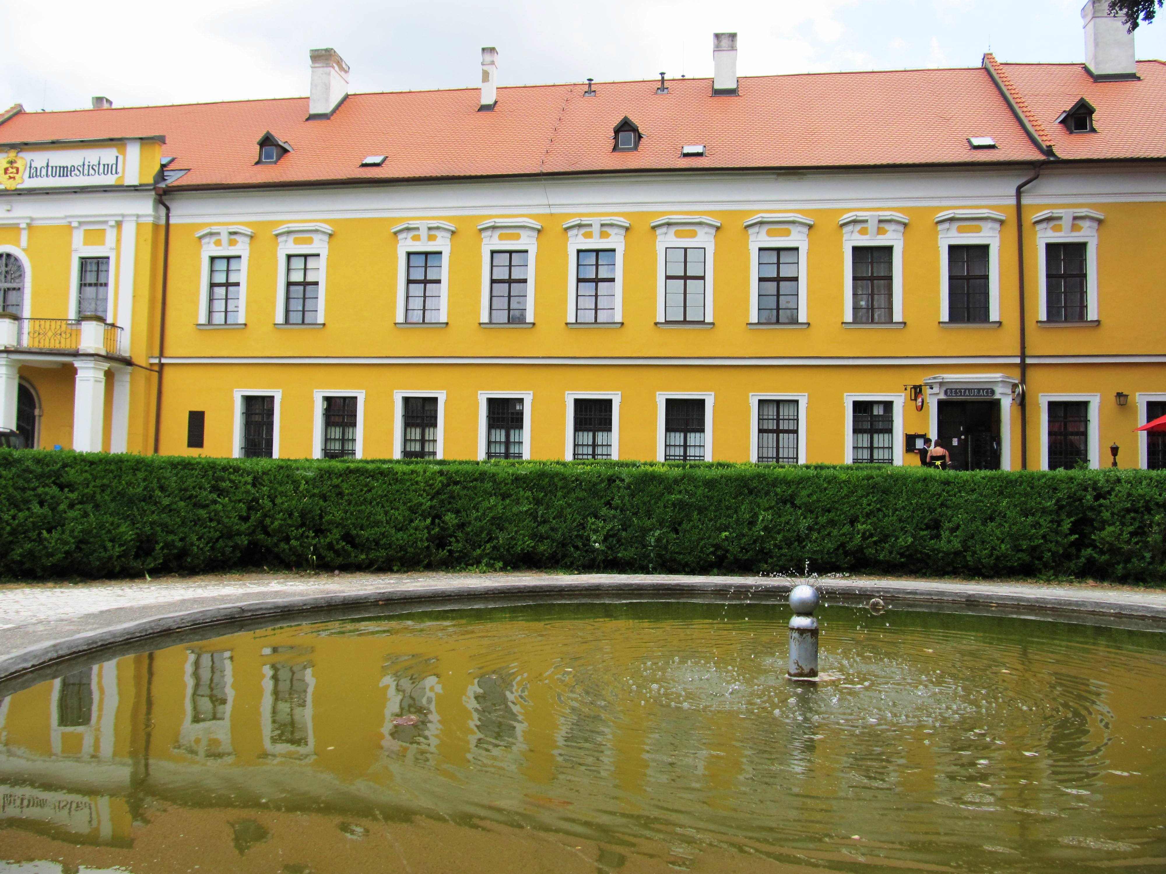 První nádvoří zámku v Brně-Líšni